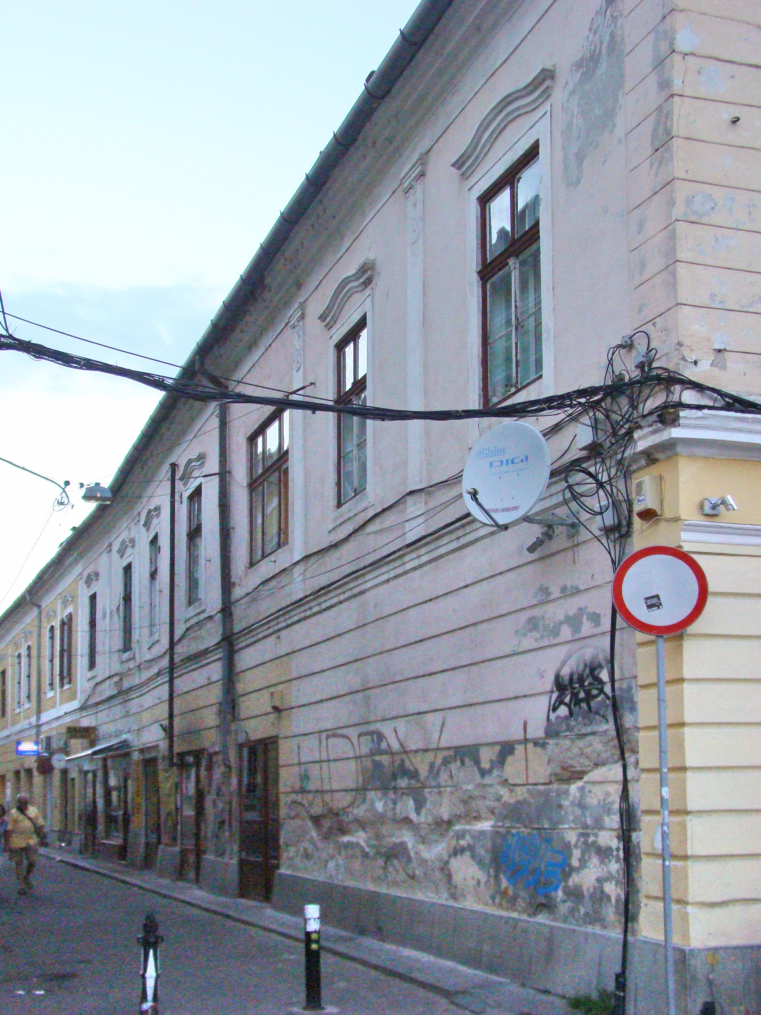 Clădire monument istoric, str. Bolyai Janos 2-4